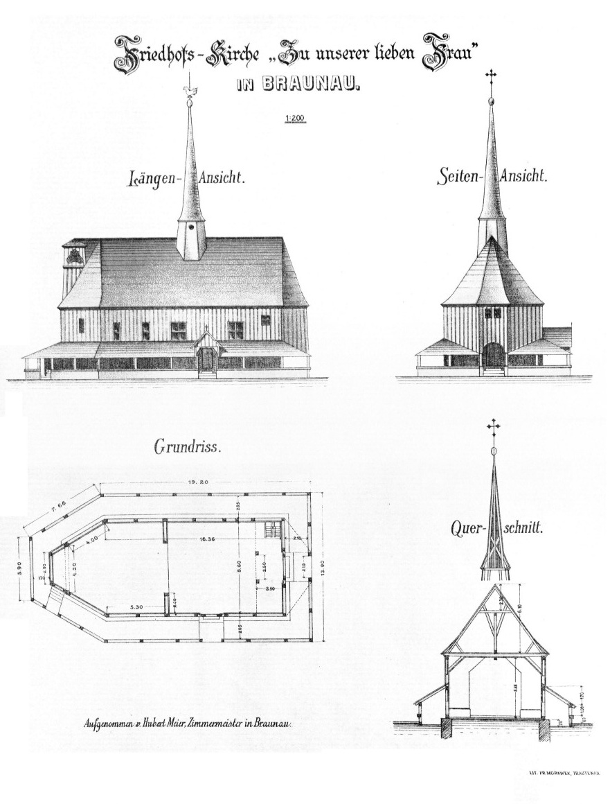 Friedhofs-Kirche "Zu unserer lieben Frau" in Braunau. Längenansicht, Seitenansicht, Grundriss, Querschnitt, 1:200